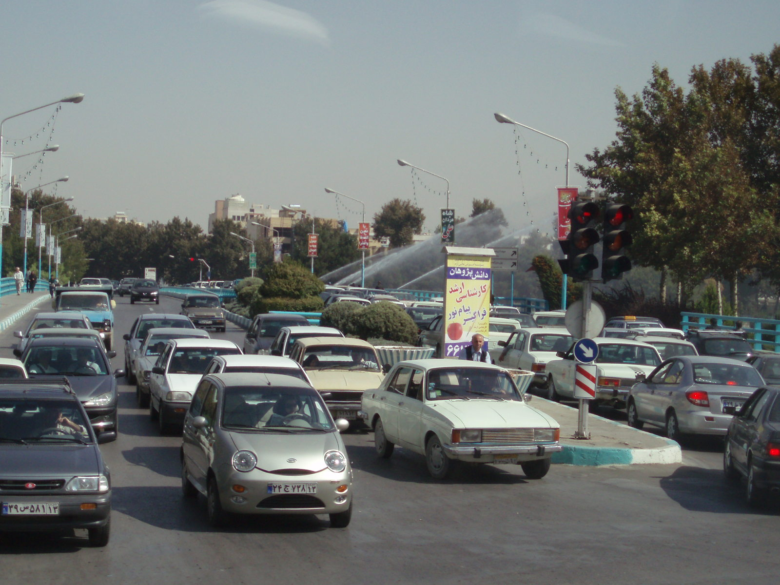 Iran 2007 207 Isfahan